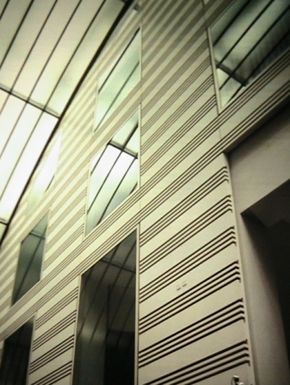 Fotis: Ella Strug, 19-24/5/2005. Donis permeson por kopii la diapozitivon por publikigo en Vikipedio al Biciklanto